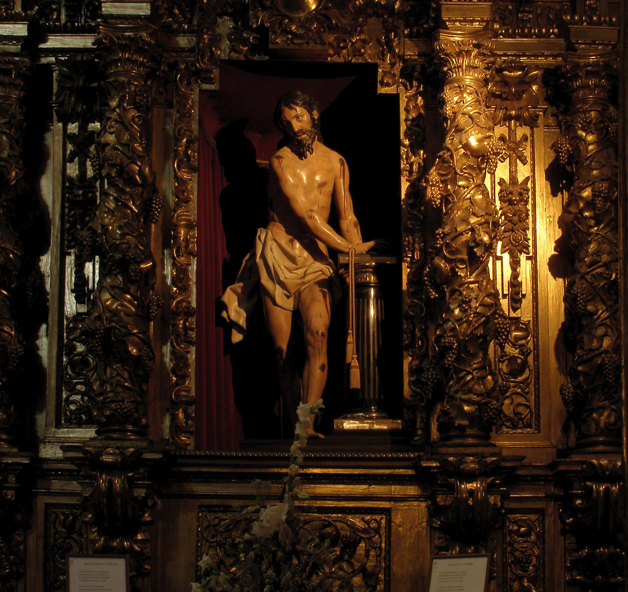 «Nuestro Señor atado a la columna.» Gregorio Fernández, c. 1620. Iglesia de la Vera Cruz, Valladolid.